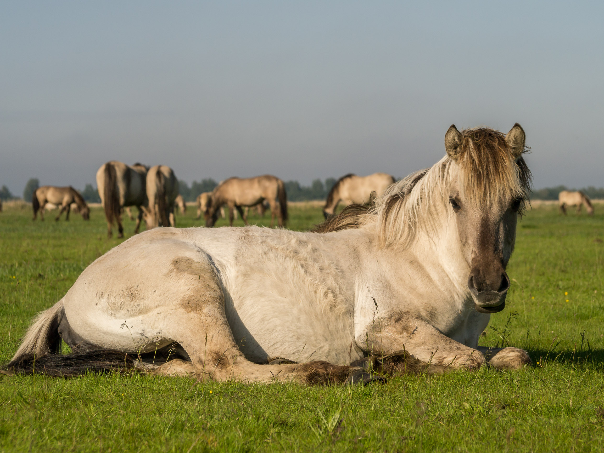 konikpaard hengst in het Lauwersmeer gebied This is a photo or sound file made in Lauwersmeer National Park in the Netherlands, with the main subject of the file in the category: animals